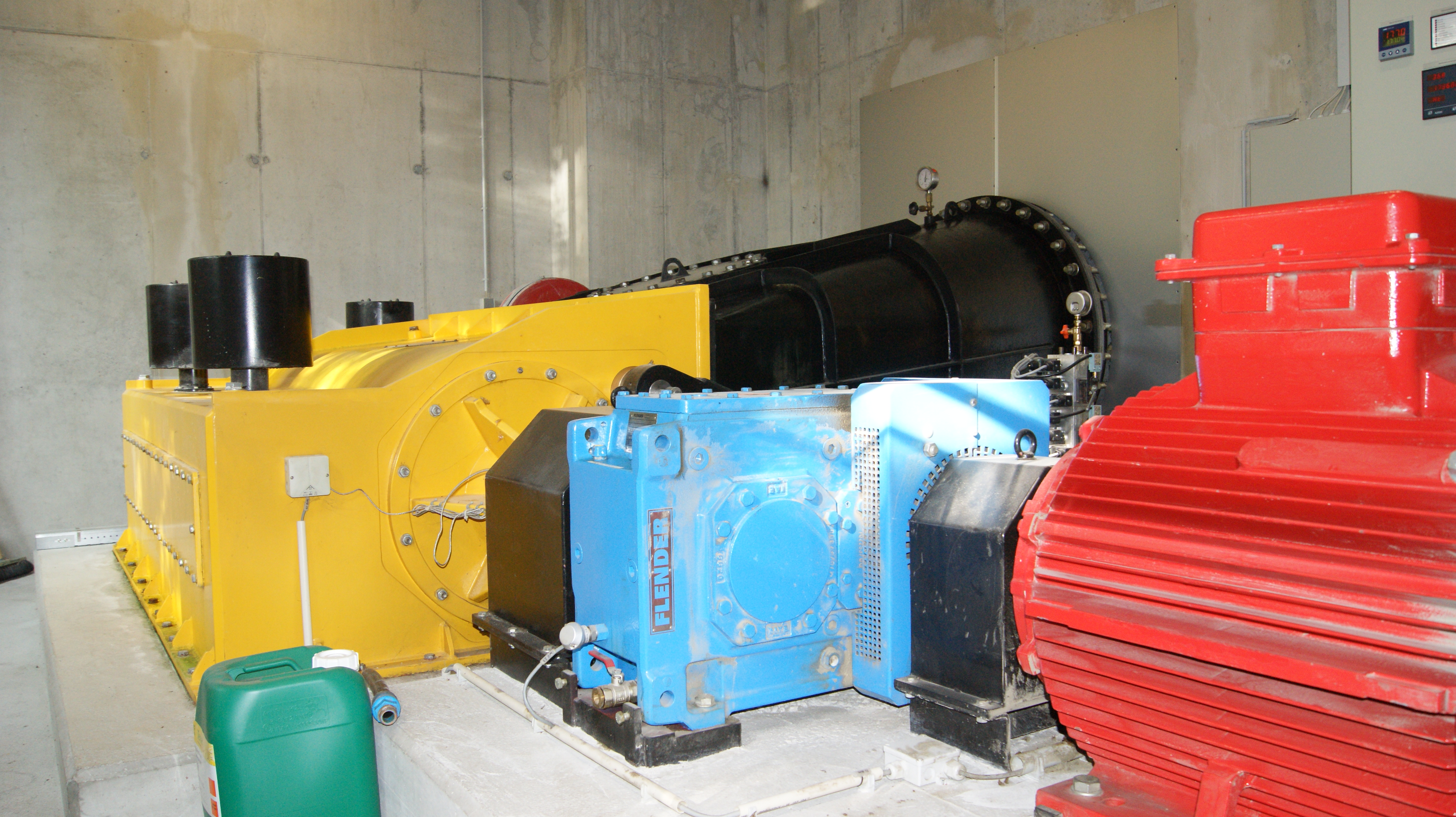 Kraftwerk Forach (Dornbirn, Vorarlberg, Österreich, Maschinengruppe.